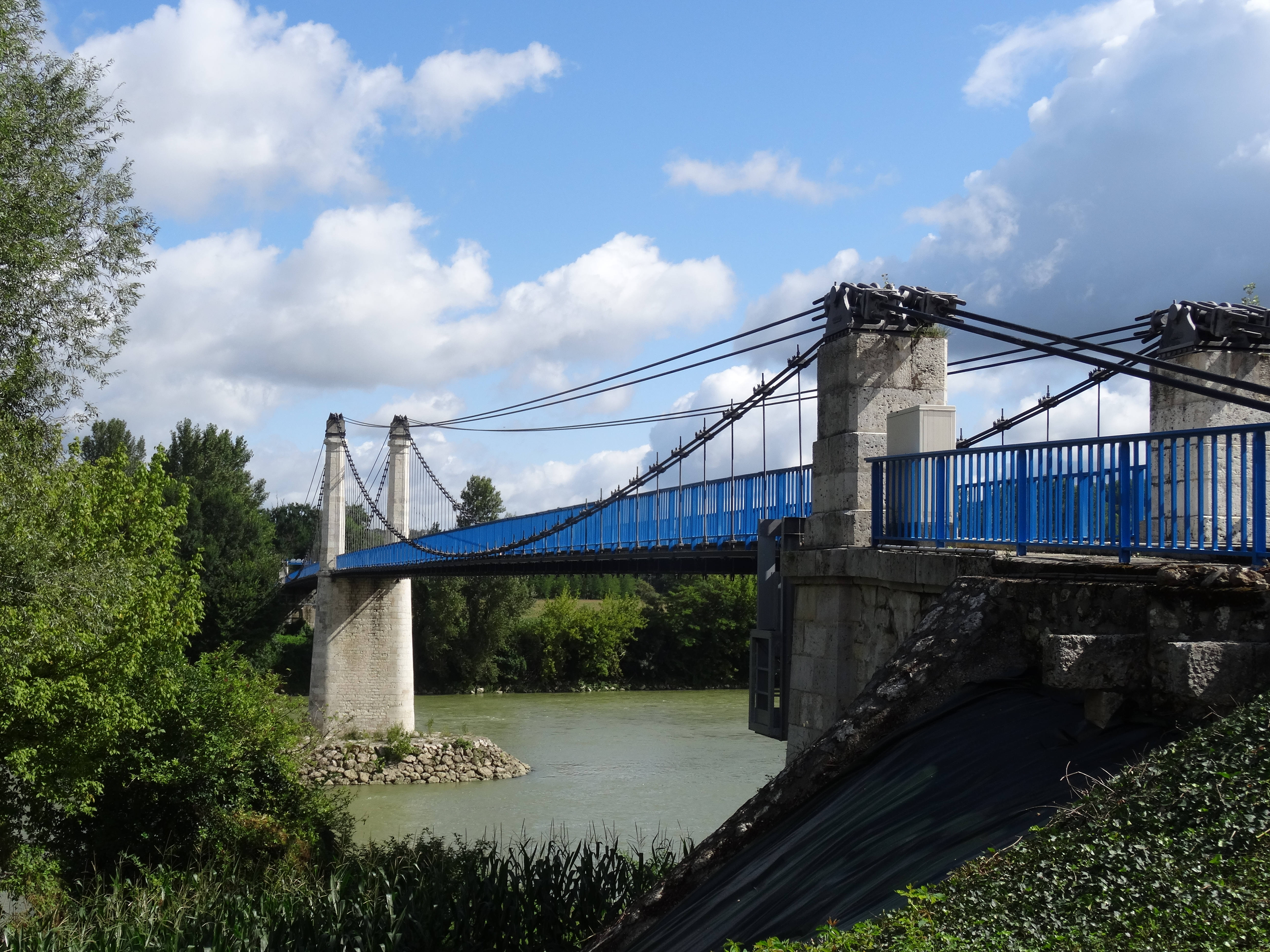 Sauveterre-Saint-Denis (47) : le pont suspendu